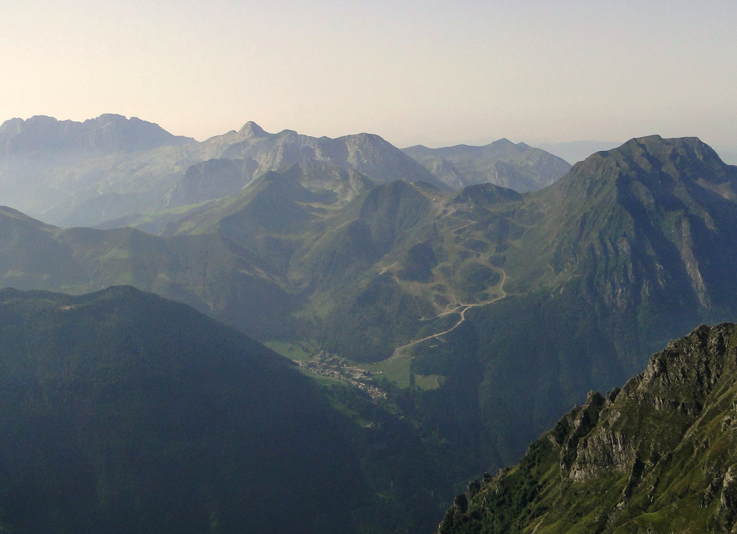 Lizzola (fraz. di Valbondione) vista dal pizzo Coca. Sullo sfondo (da destra) la Presolana, il monte Ferrante ed il monte Vigna Soliva